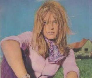 Liliana Caldini